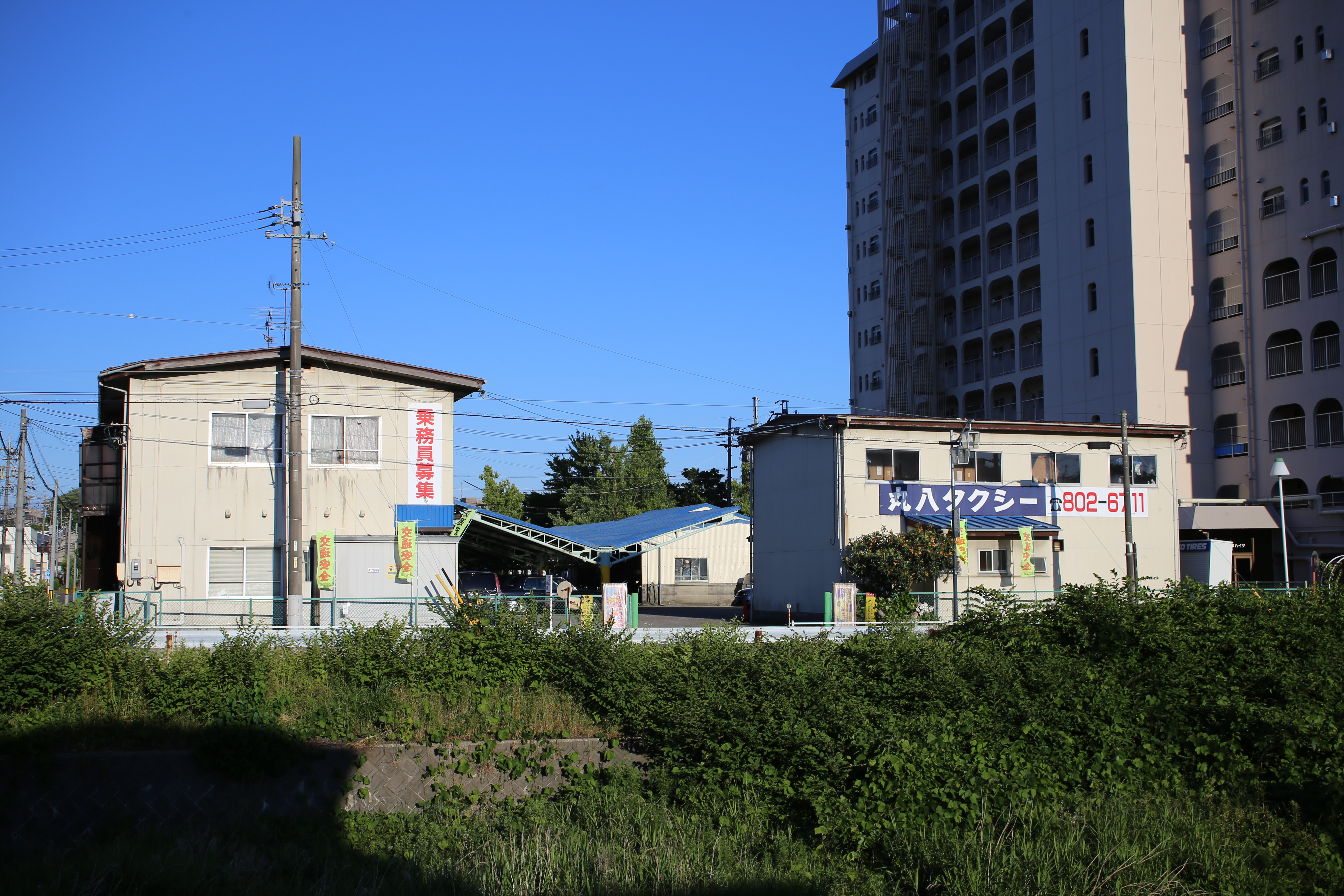 名古屋市天白区植田西二丁目の丸八交通本社を西側河川対岸公道北側より撮影